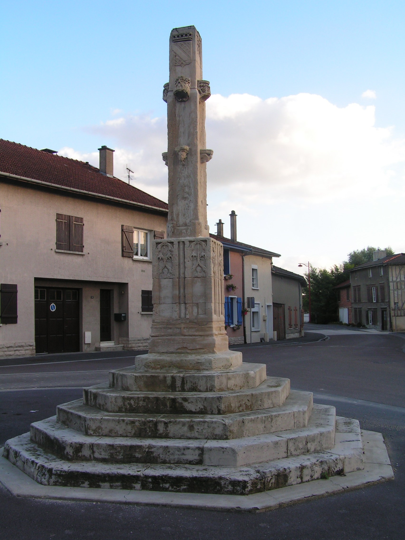 Calvaire de Vitry-en-Perthois (Classé) .